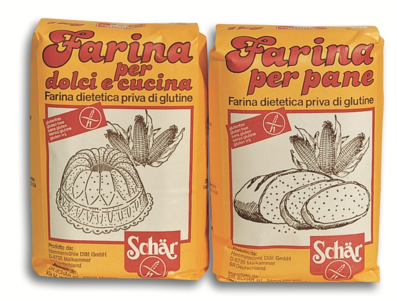 Dr. Schär frühere Verpackungen